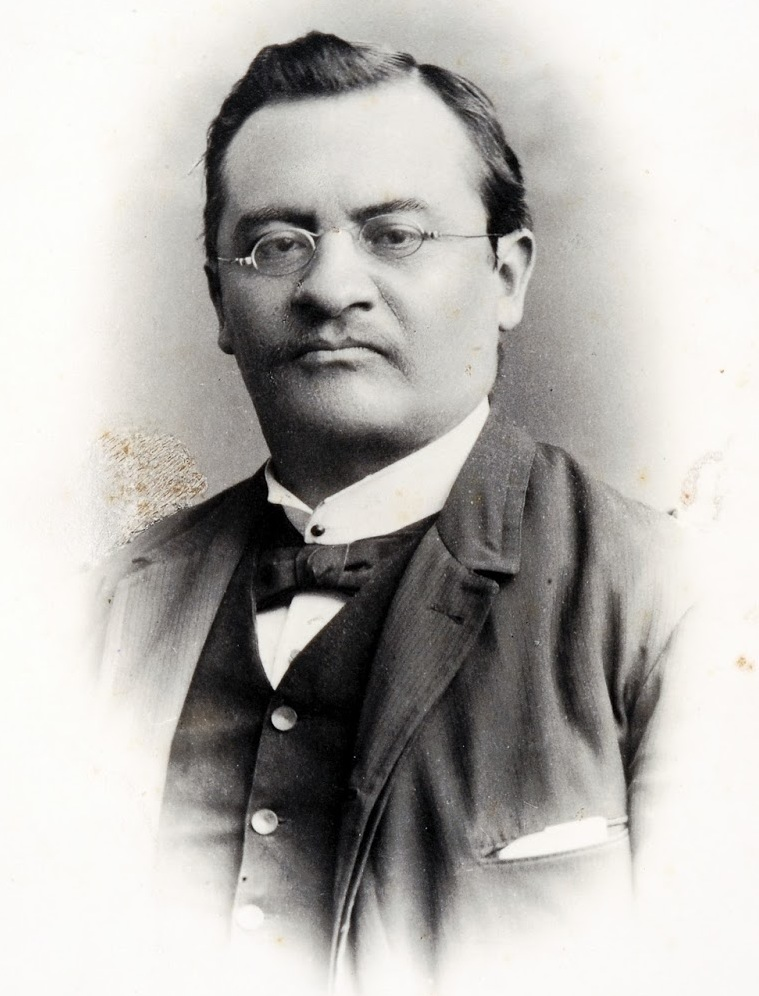 Abelardo Manuel Gamarra Rondó, apodado el Tunante (Huamachuco, 31 de agosto de 1852 - Lima, 9 de julio de 1924) fue un escritor, periodista, político y compositor peruano.